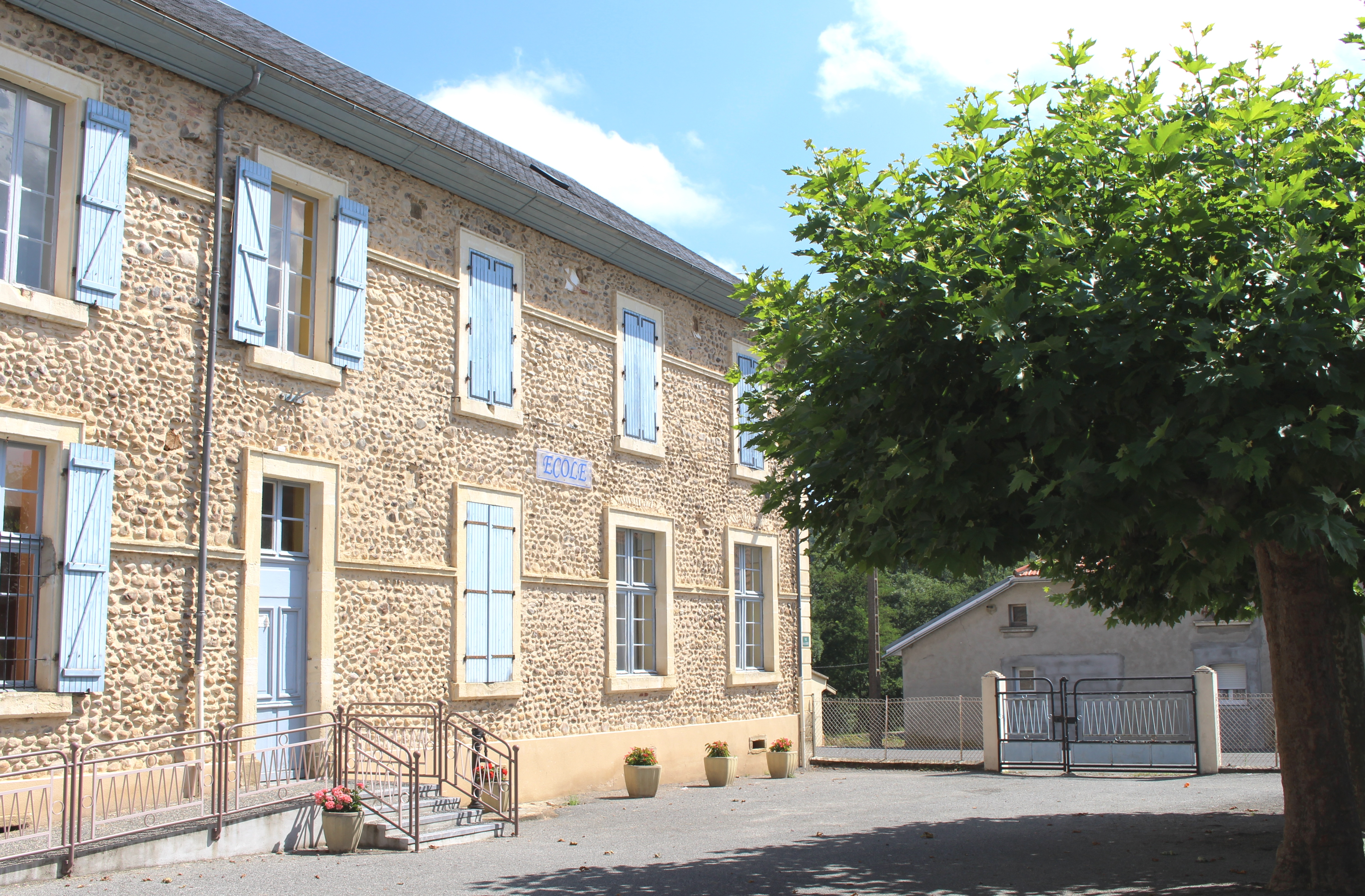 École de Montastruc (Hautes-Pyrénées)